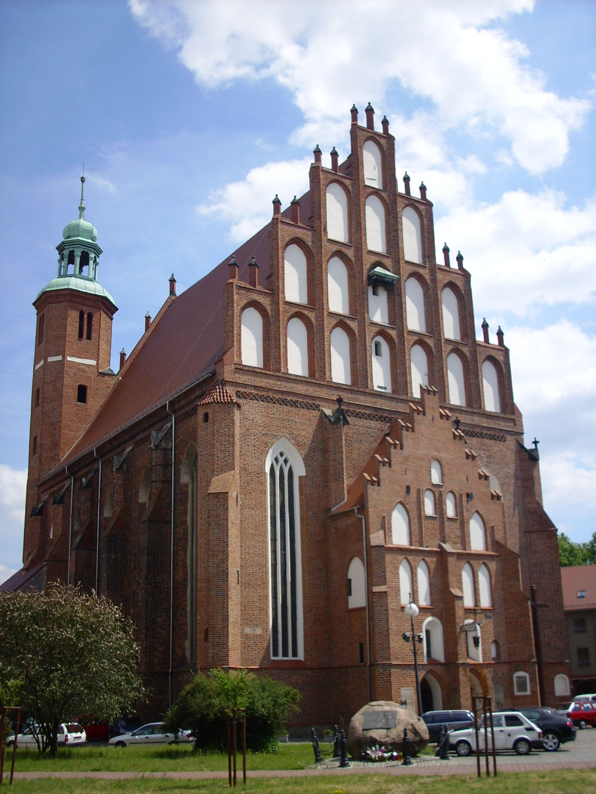 Kościół pw. Najświętszego Serca Pana Jezusa w Żarach